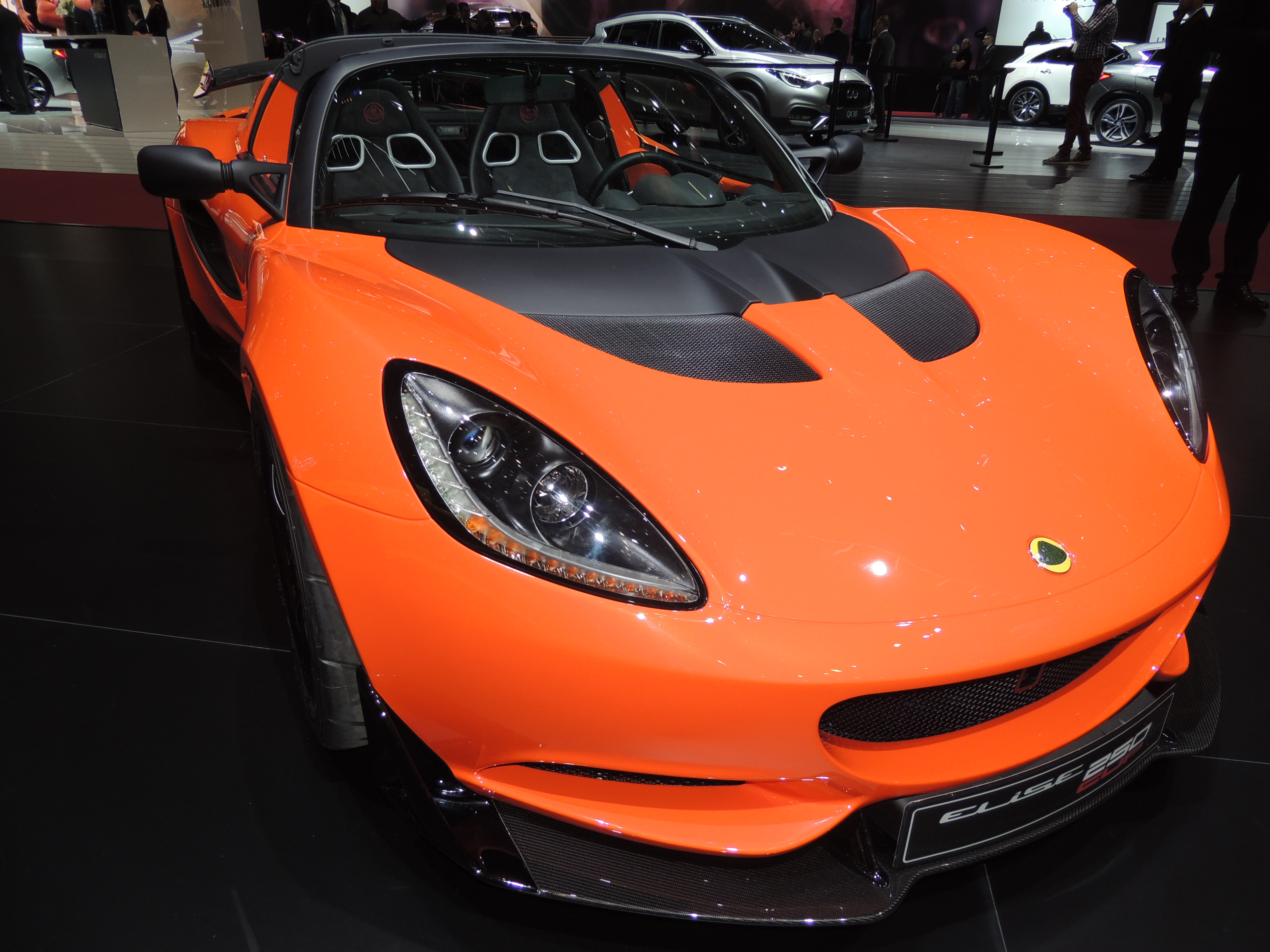 Lotus Elise Cup 250, salon de Genève 2016